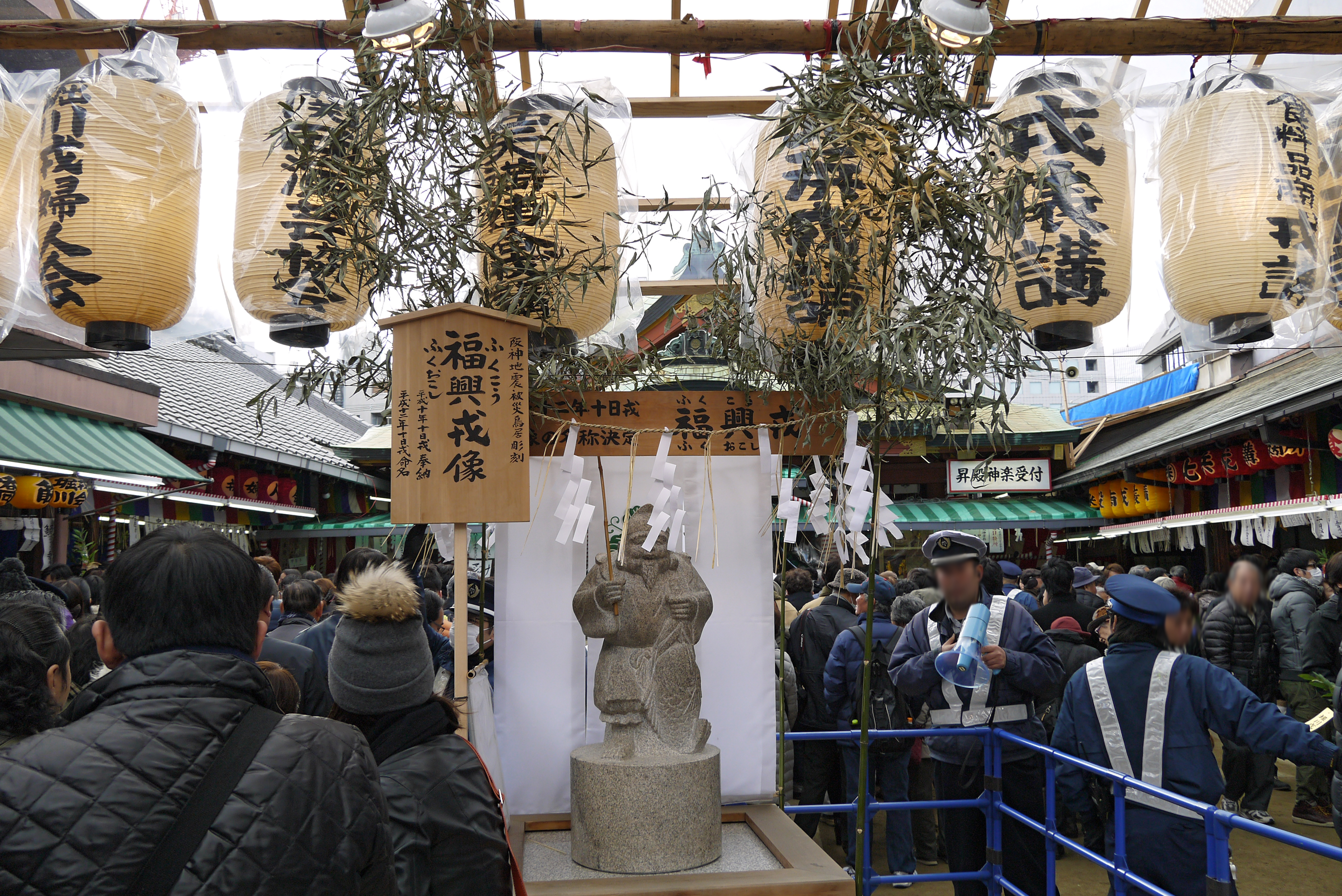 Horikawa-ebisu-jinja (堀川戎神社), Osaka, Osaka prefecture, Japan